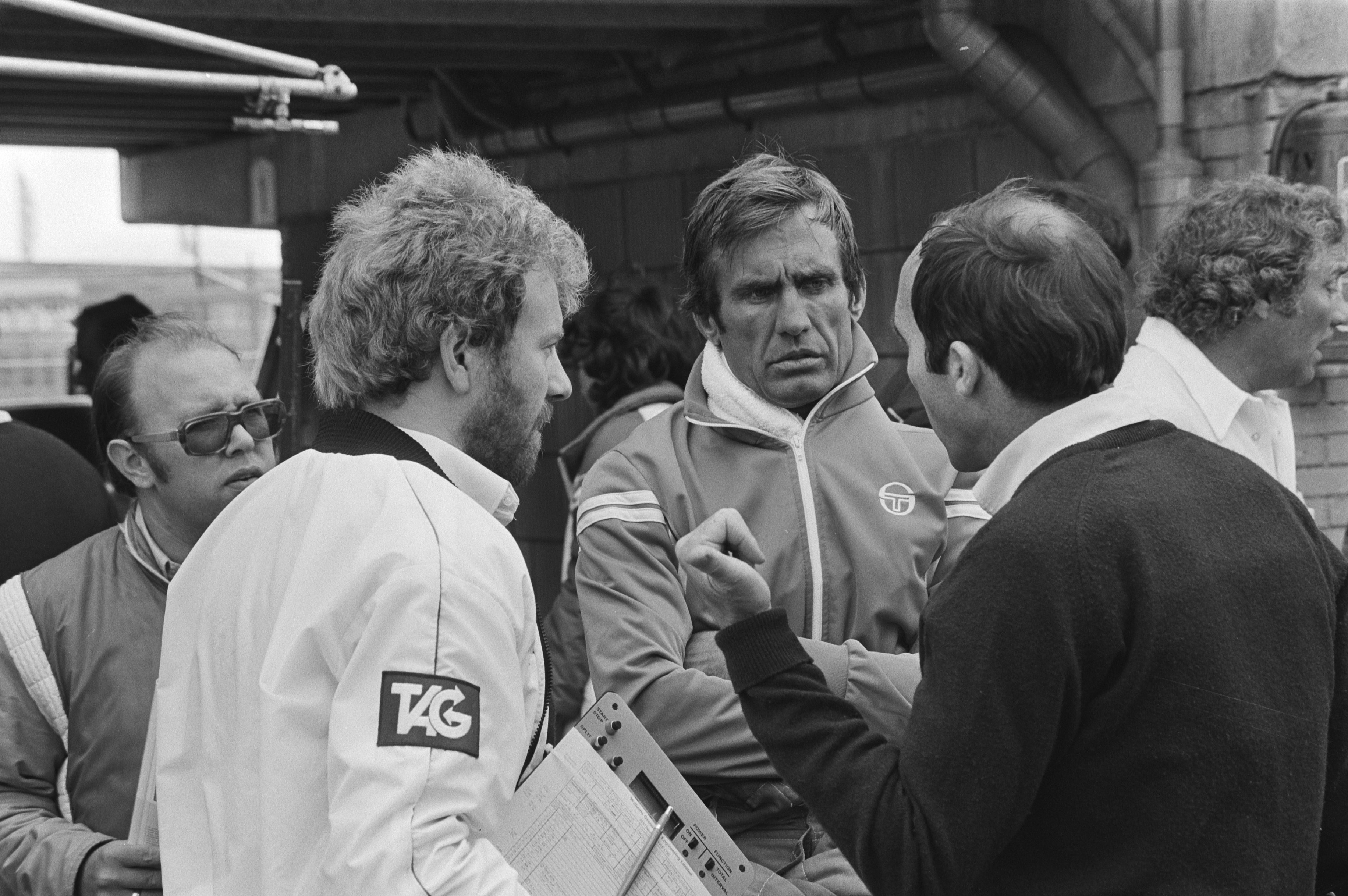 Teameigenaar Frank Williams (rechts) in gesprek met Williams-Ford Formule 1coureur Carlos Reutemann (midden) tijdens de training van de Grand Prix Formule 1 van Zandvoort in 1981.